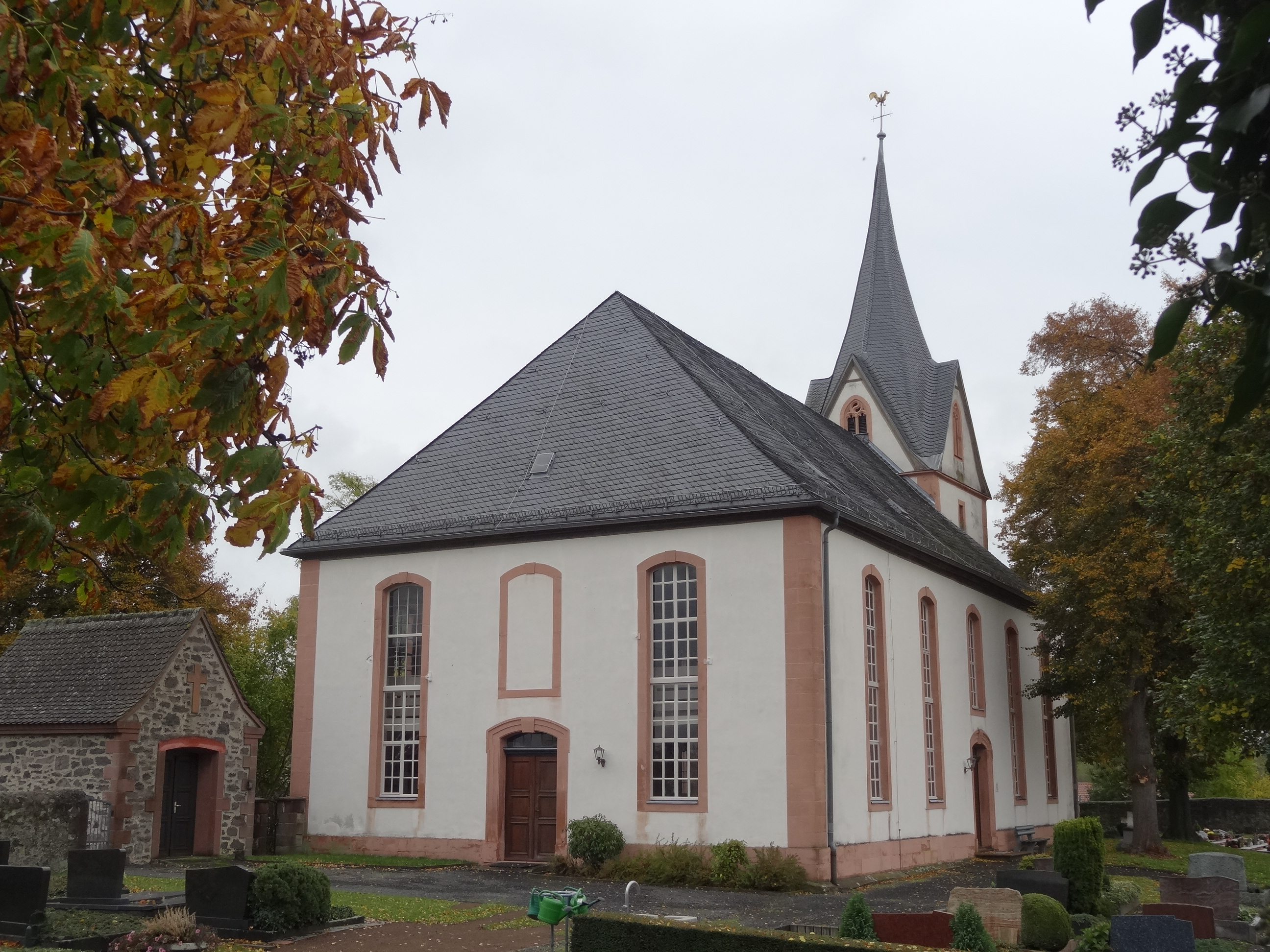 Evangelische Kirche Rodheim (Hungen